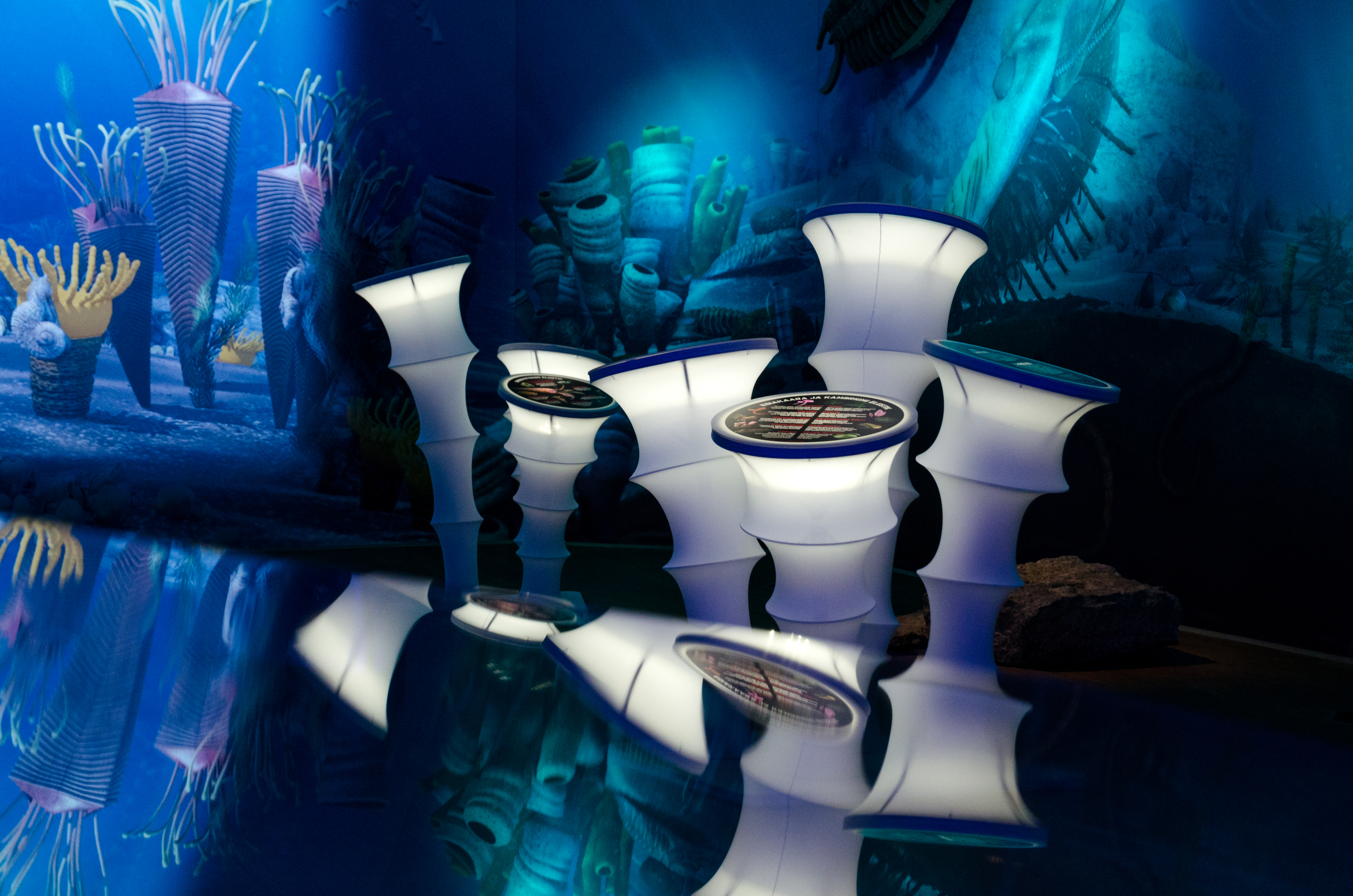 Näitus "Müstiline ürgmeri"